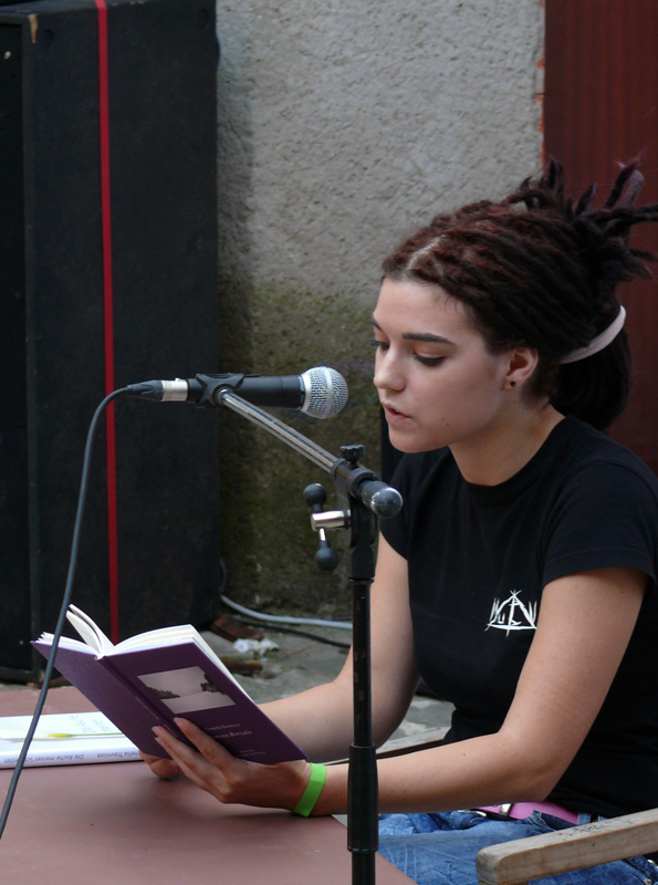 Cornelia Travnicek